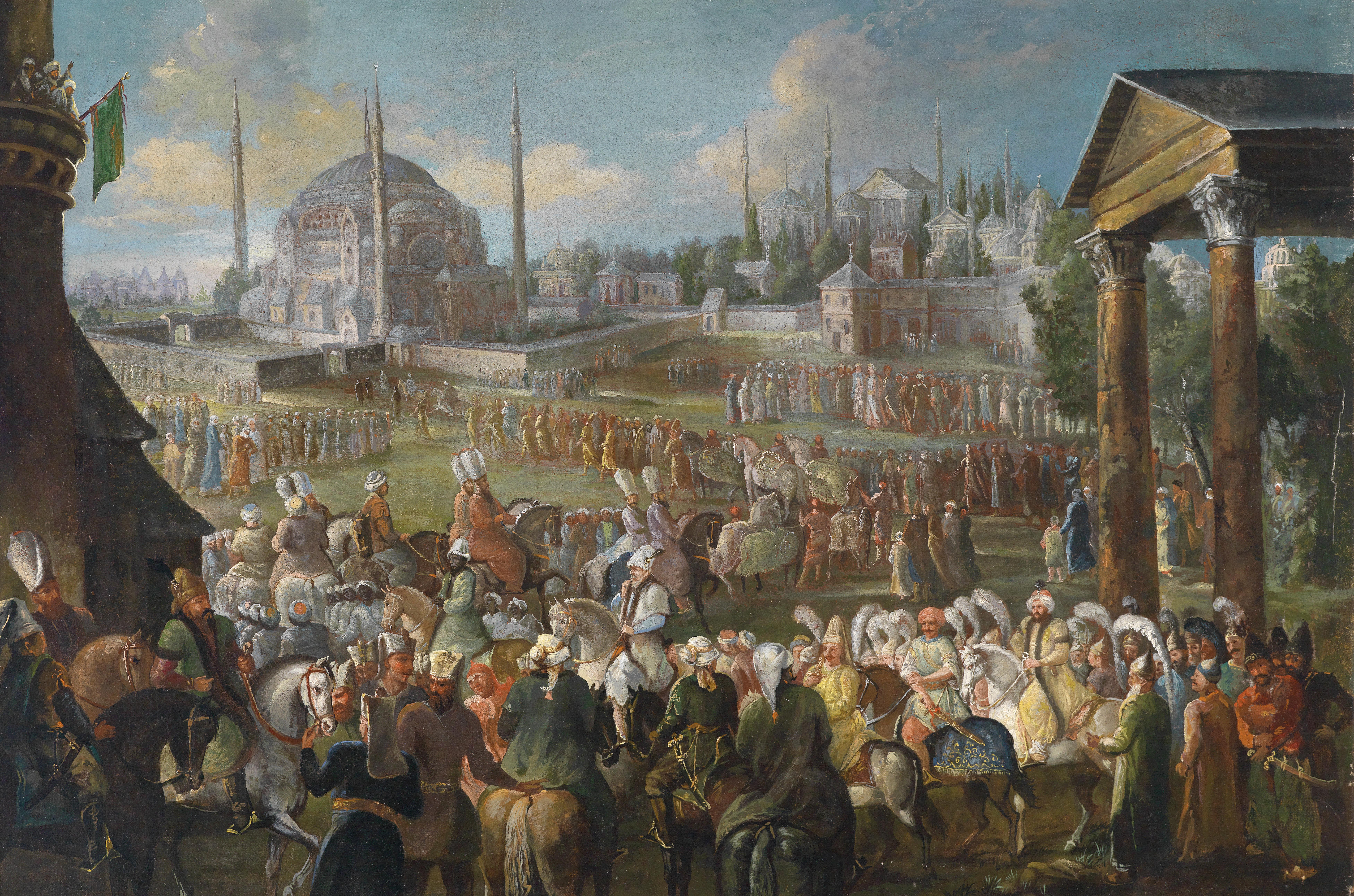 Eine Prozession des Sultans in Istanbul, Öl auf Leinwand, 62 x 93 cm